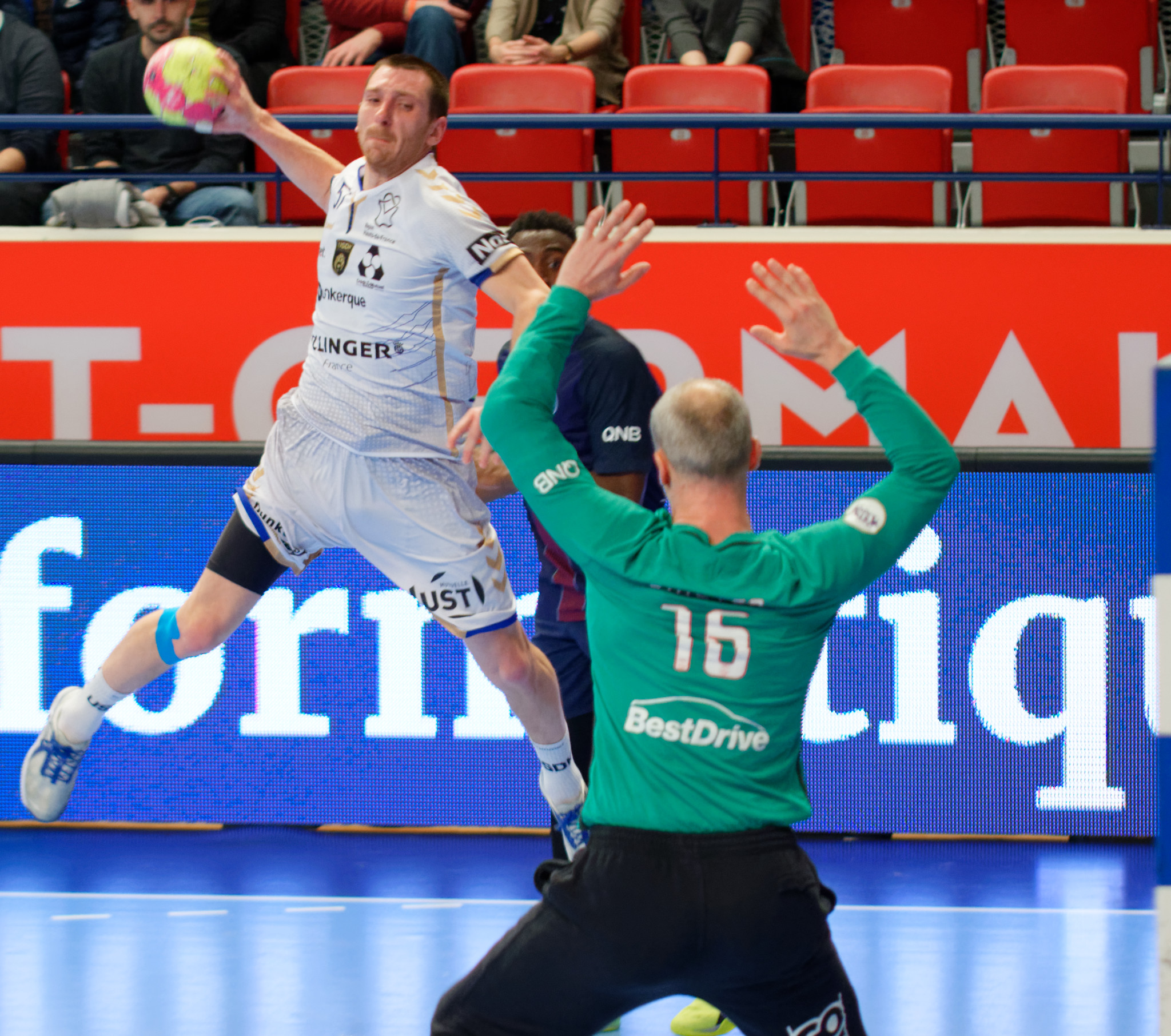 Rencontre de LidlStarligue entre le PSG et l'S Dunkerque. A Coubertin, le 08 mars 2017.